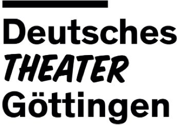 Neues Logo ab 2014/15, Deutsches Theater Göttingen